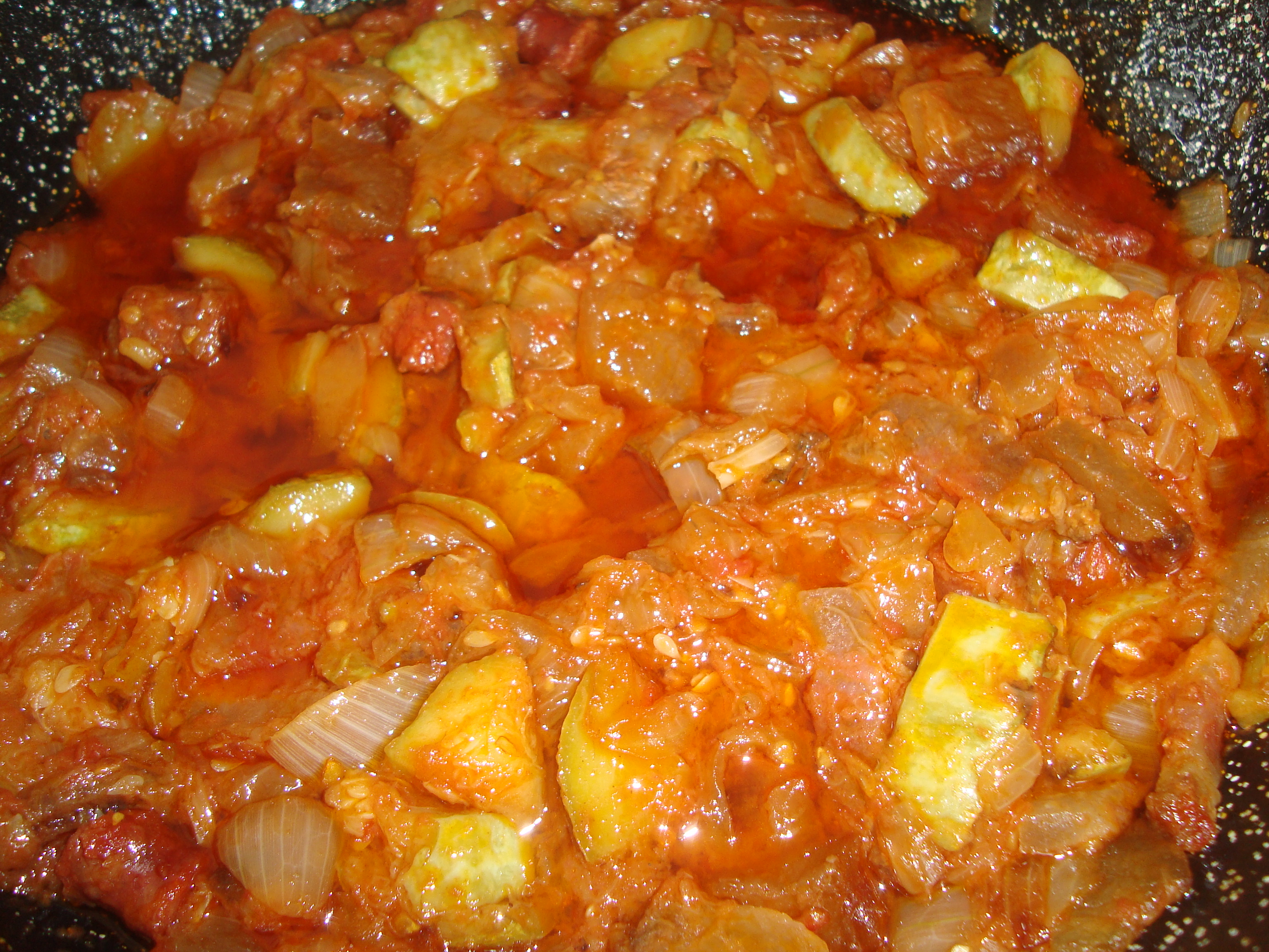 Chanfaina de verduras